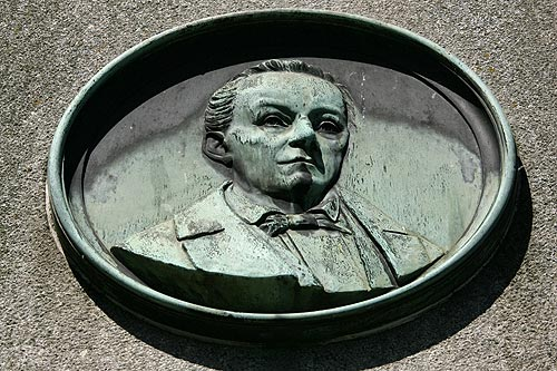 Olten: Denkmal Bundespräsident Jos. Munzinger